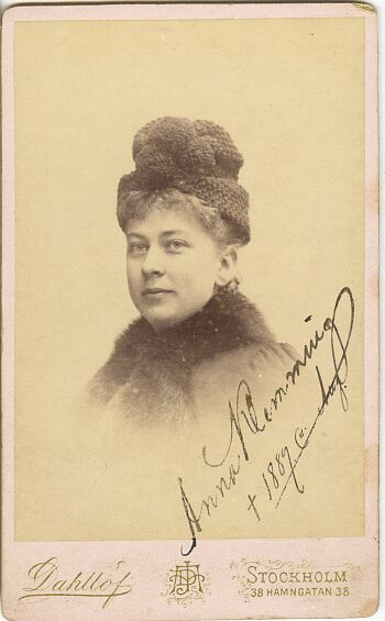 Operasångerskan Anna Klemming